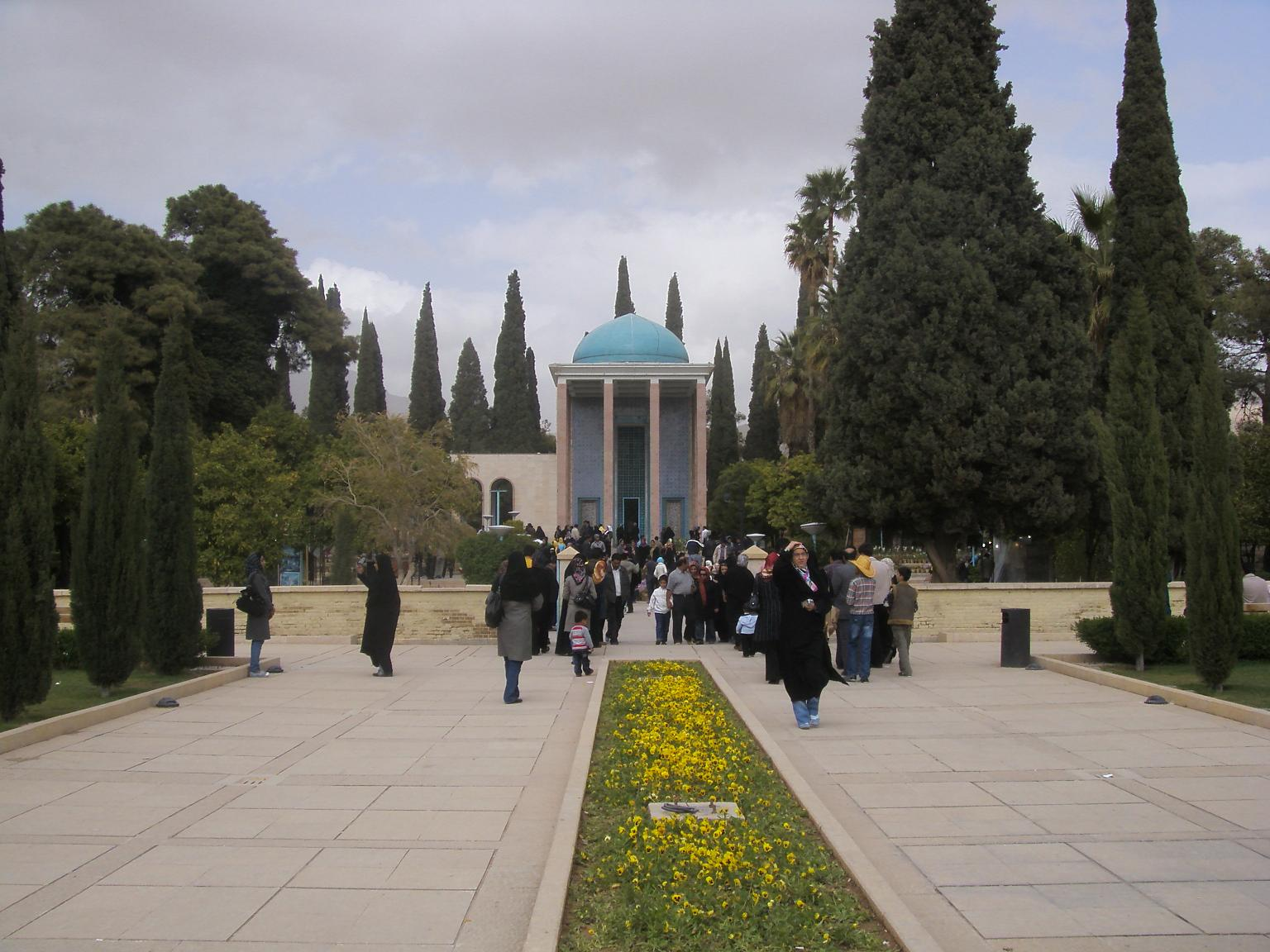 Sa'diyeh, Shiraz, Iran